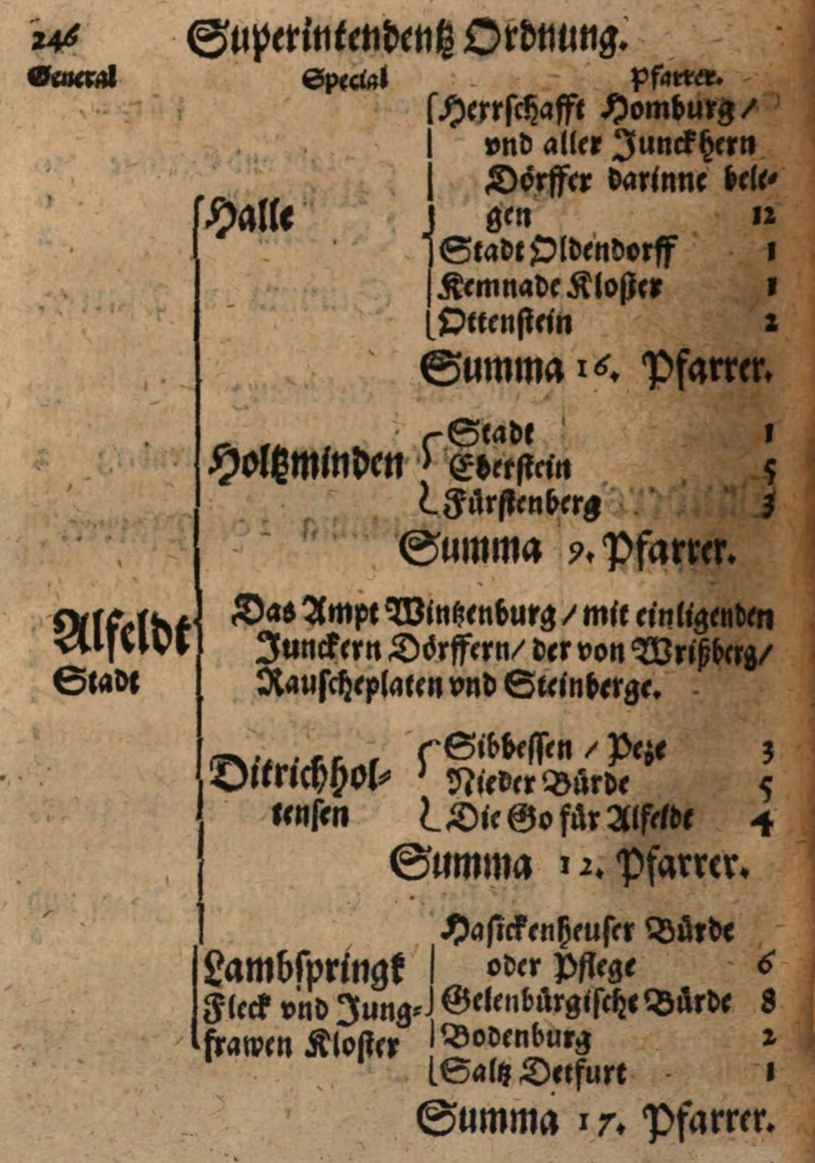 Die Generaluperintendentur Alfeld mit den zugeordneten Spezialsuperintendenturen und Pfarrorten in der Braunschweig-Wolfenbütteler Kirchenordnung von 1569. Der größte Teil des Gebiets fiel 1643 (wieder) an das Hochstift Hildesheim und mit diesem im 19. Jahrhundert an das Königreich Hannover und dessen Landeskirche.